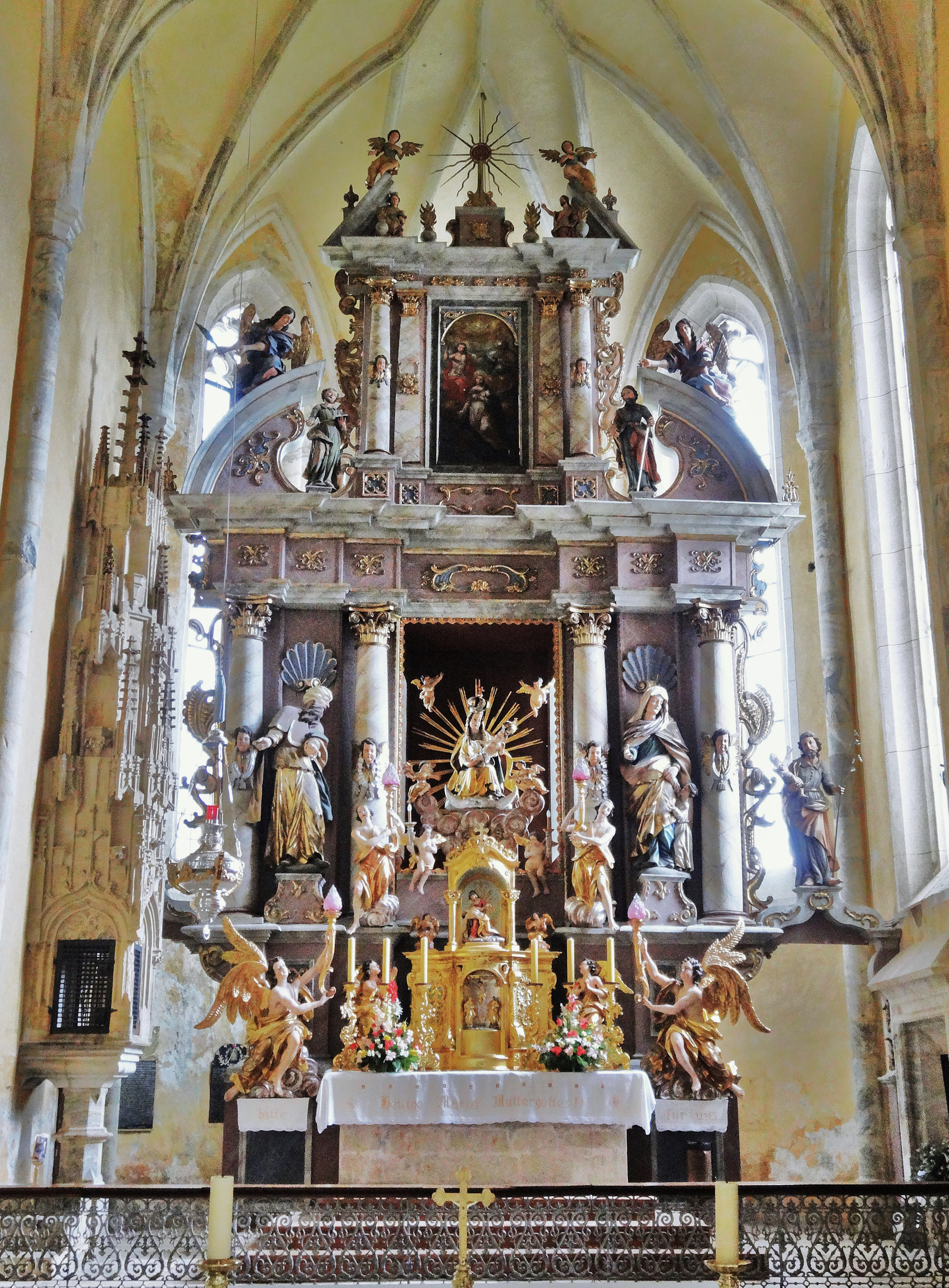 Kath. Pfarrkirche und Wallfahrtskirche Unsere Liebe Frau (Maria Waitschach), Der Hochaltar